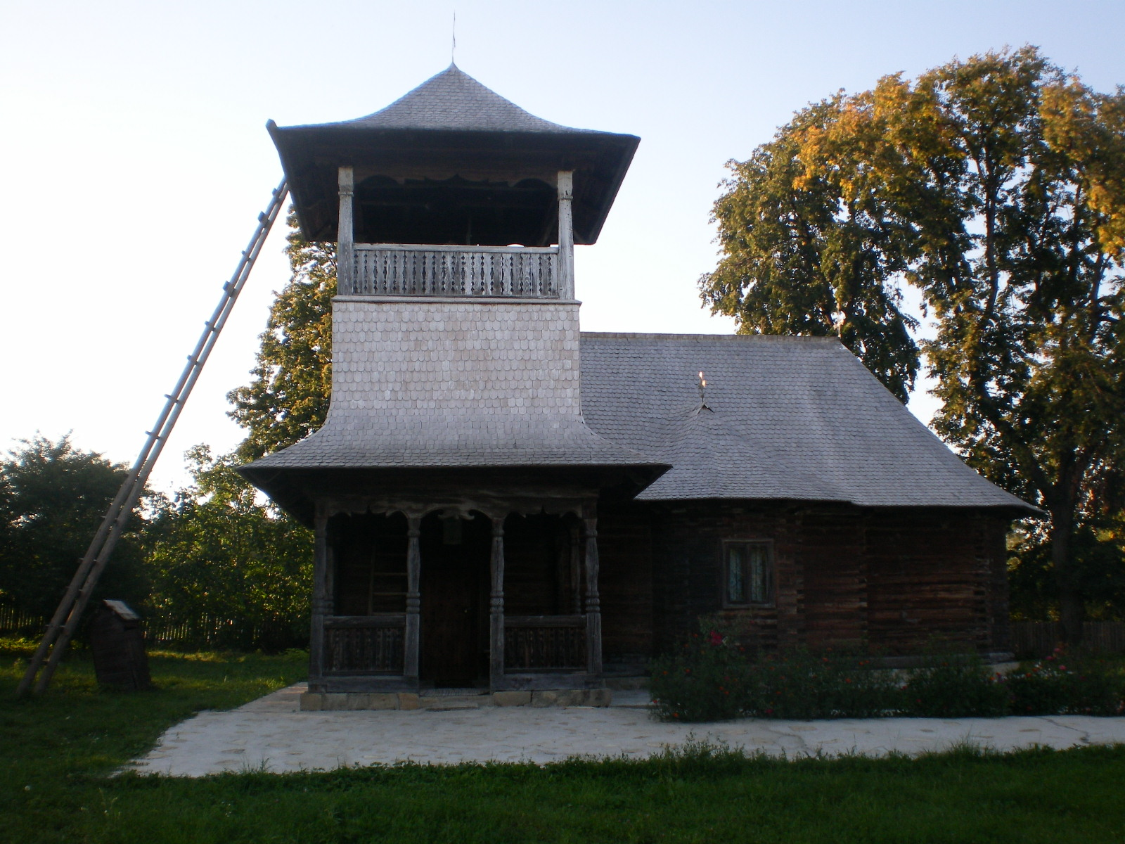 Biserica de lemn "Adormirea Maicii Domnului" din Brăeşti, Botoşani, construită în 1745.